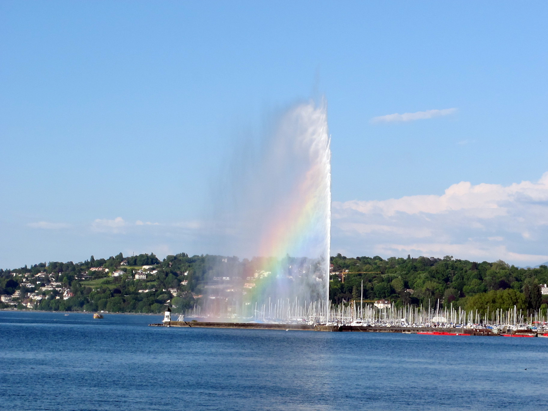 Ginevra